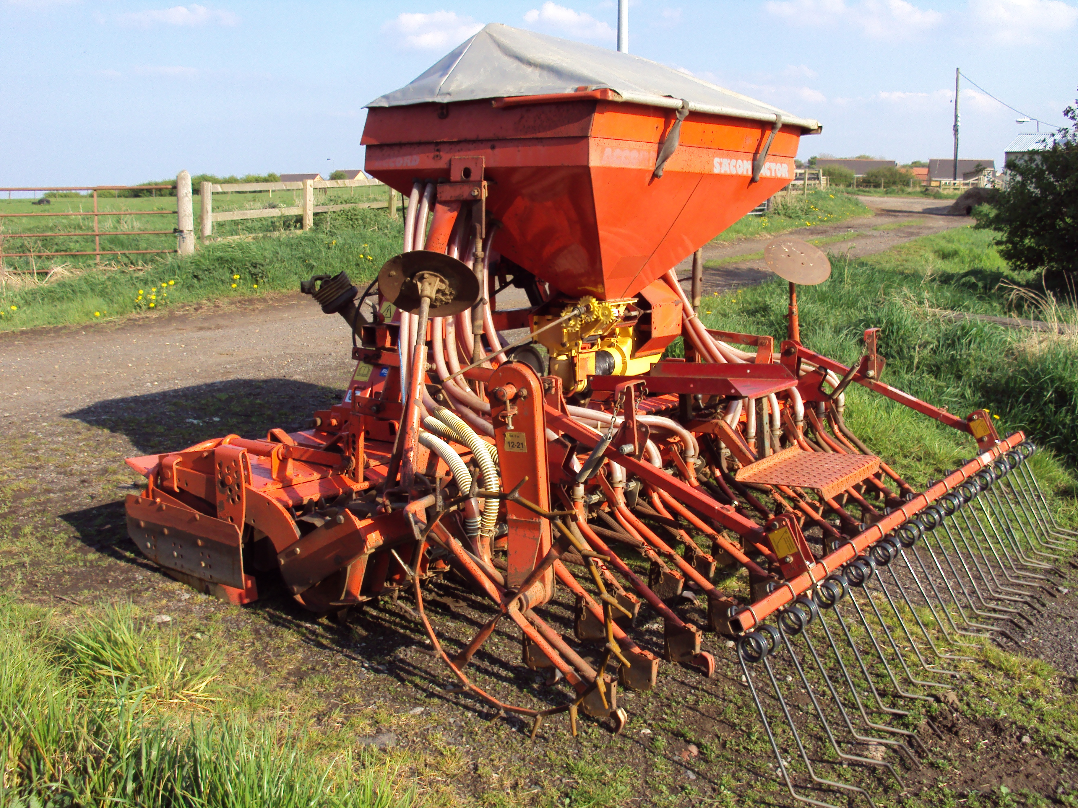 Pneumatische Drillkombination Accord Säcompactor (Kverneland)